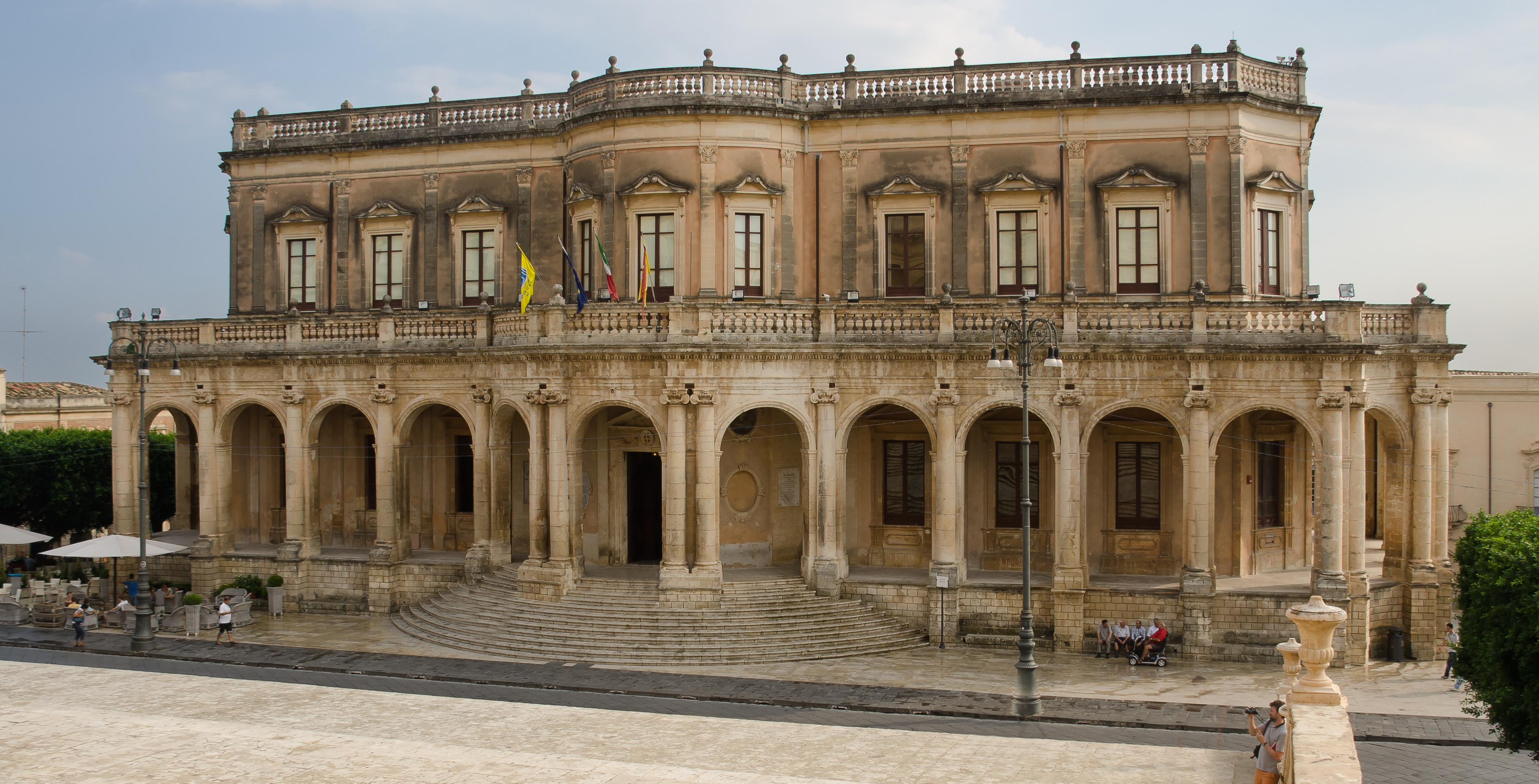 Palazzo Ducezio, Noto, Sicily